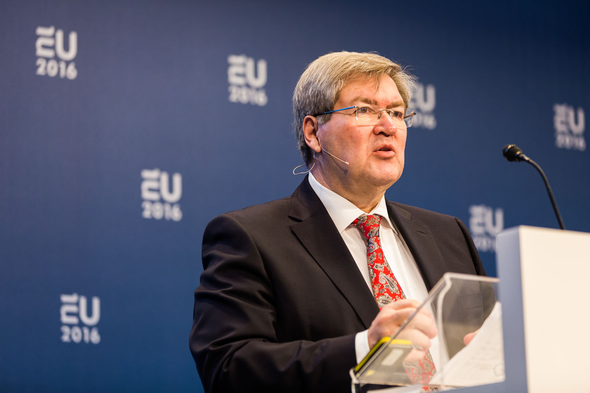 EU 2016,Amsterdam, 8 februari 2016. Conferentie van ministerie van Sociale Zaken en Werkgelegenheid SZW, "Promoting Decent Work" Op de foto : Koos Richelle